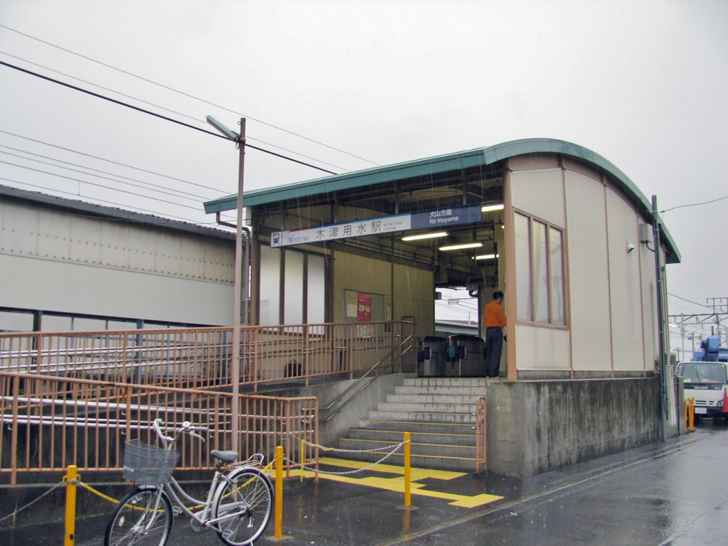 名鉄犬山線木津用水駅